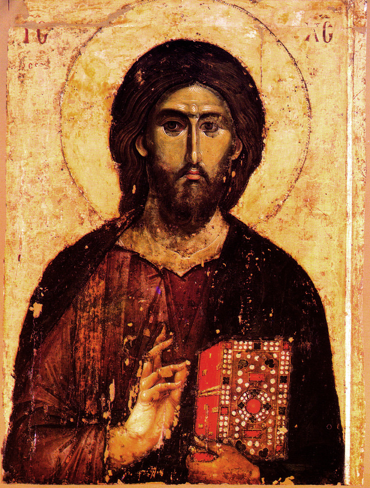 Ikone Pantokrator 13. Jh Христос Пантократор. Икона из монастыря Хиландар. 1260-е гг.